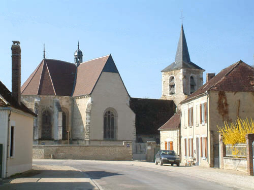 Eglise Saint Loup.